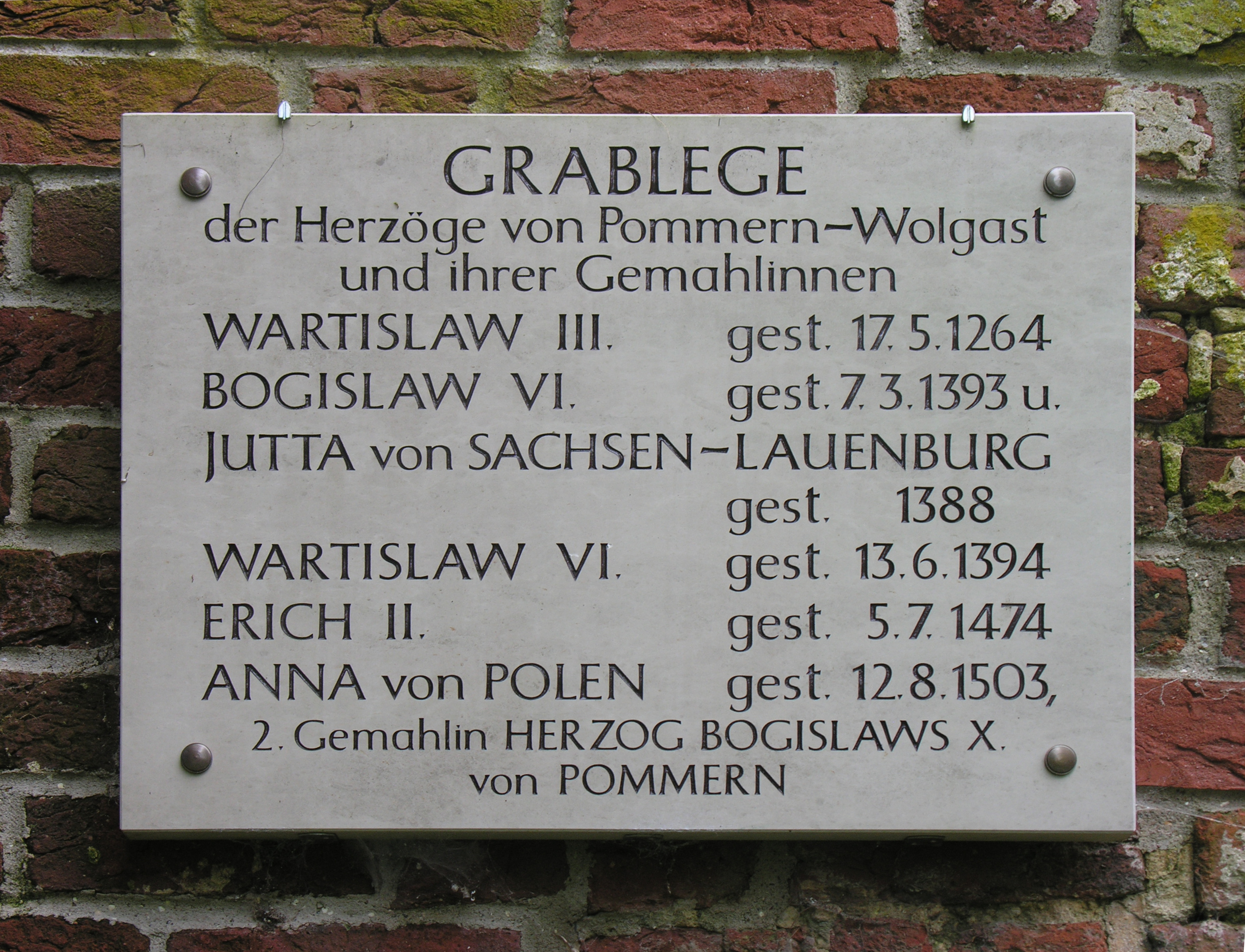 Tafel der Beisetzungen der Herzogsfamilie im Kloster Eldena